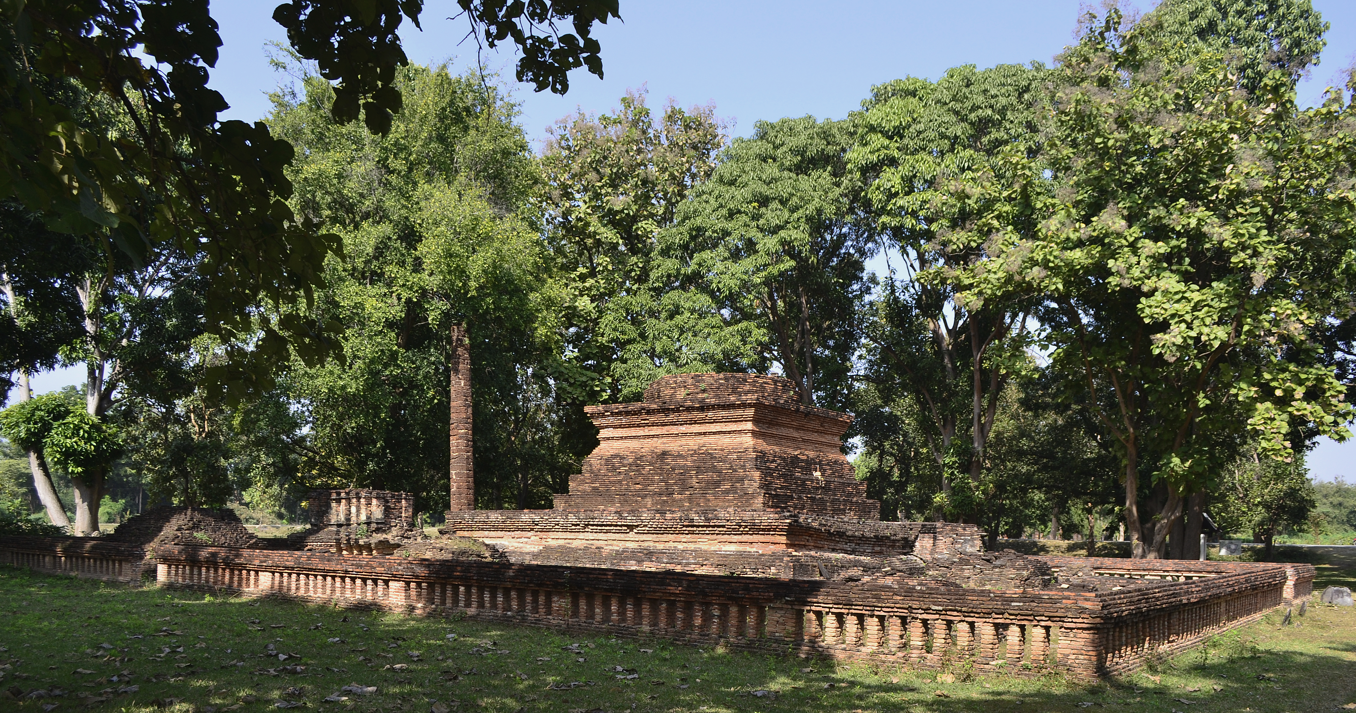 Wat Pa Mamuang im Geschichtspark Sukhothai